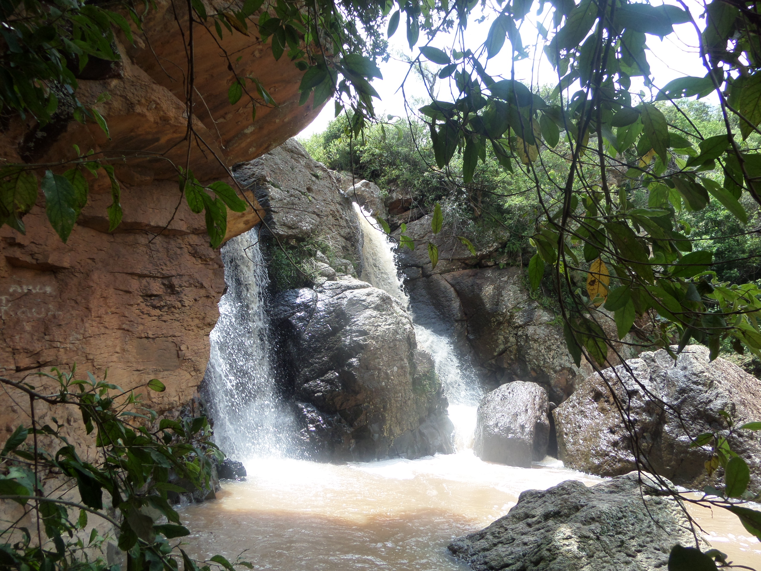 Cascada comunidad de Piñicuaro